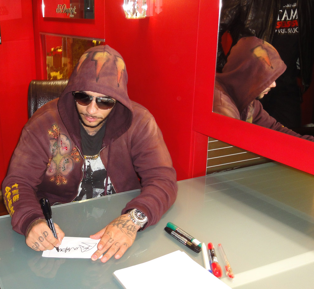 Тимати в Ростове после пресс-конференции